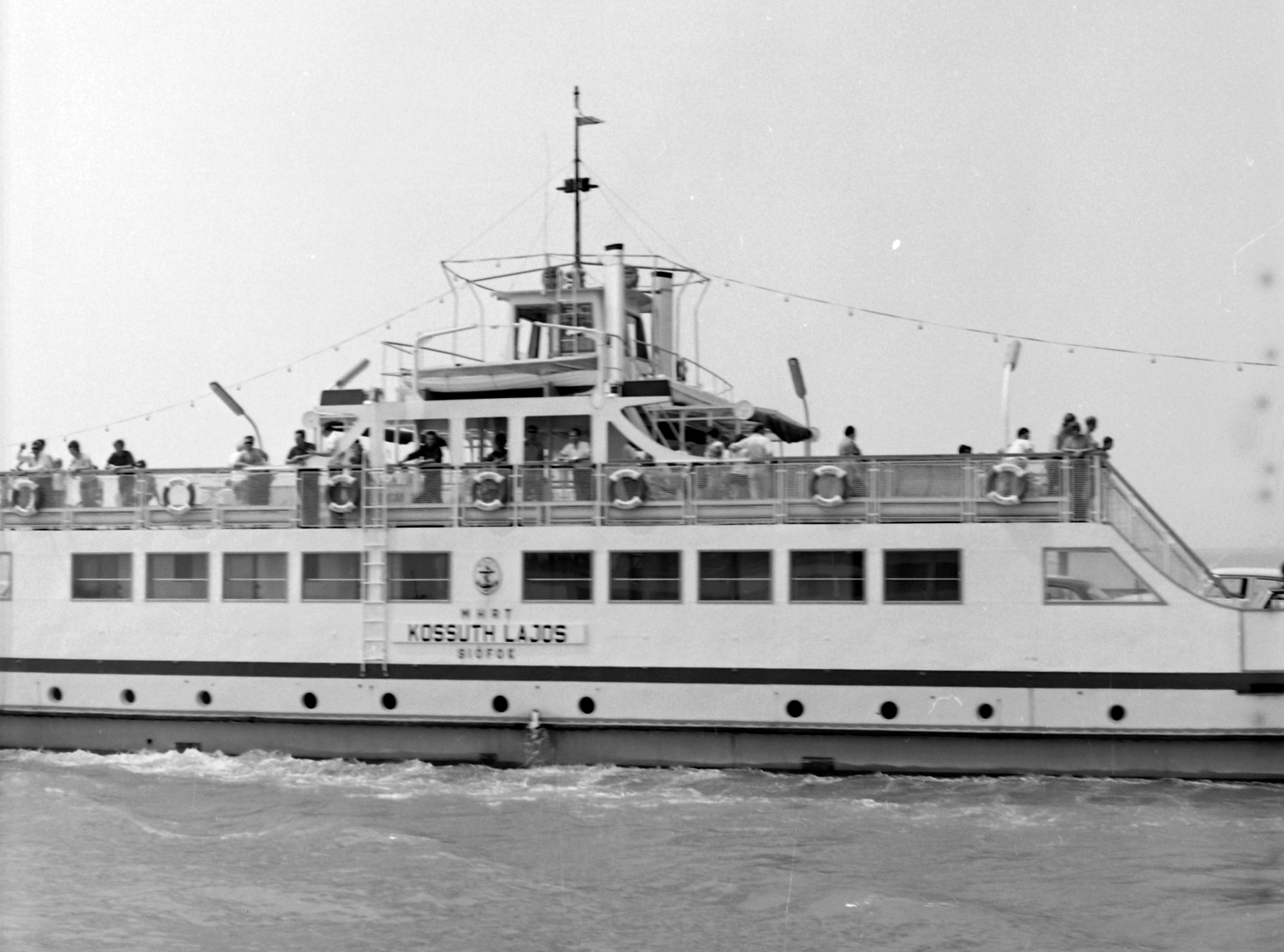 Kossuth Lajos komp. Location: Hungary, Lake Balaton Tags: ship, ferry, Kossuth Lajos/Komp III. ship Title: Kossuth Lajos komp.